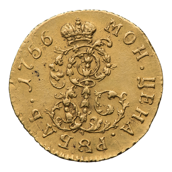 Рубль 1756 г. Императрица Елизавета Петровна. Новодел пробной монеты для дворцового обихода. Вензель императрицы Елизаветы Петровны 𝓔𝓟, над вензелем императорская корона. Круговая надпись: МОН ∙ ЦЕНА ∙ РUБЛЬ ∙ 1756 ∙. Узд. 4075Н ; Биткин Н566 (R3); Дьяков 1.1.386 (R3); Sev. 203 . Реверс